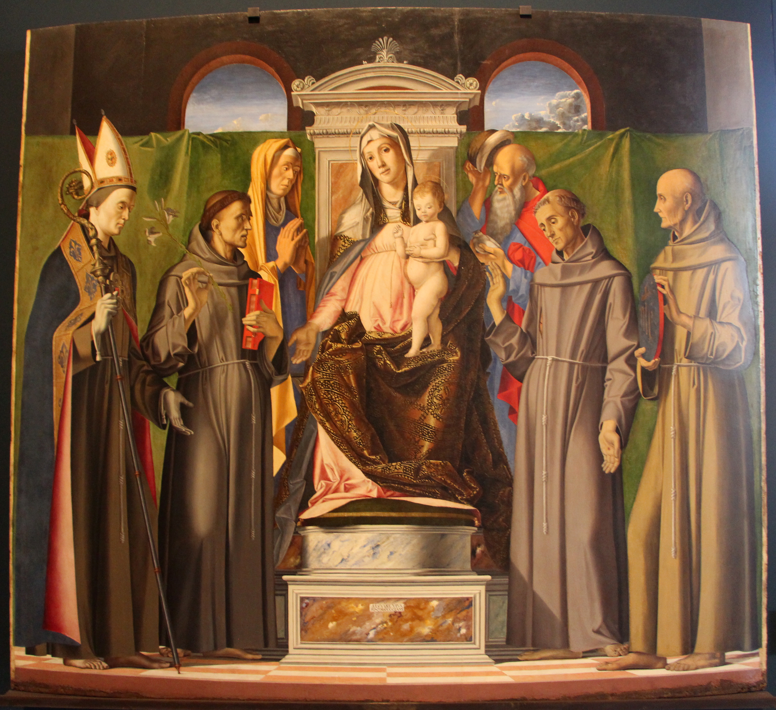 Gallerie dell'Accademia - MIBAC The making of this document was supported by Wikimedia CH. (Submit your project!) For all the files concerned, please see the category Supported by Wikimedia CH. This is a photo of a monument which is part of cultural heritage of Italy.